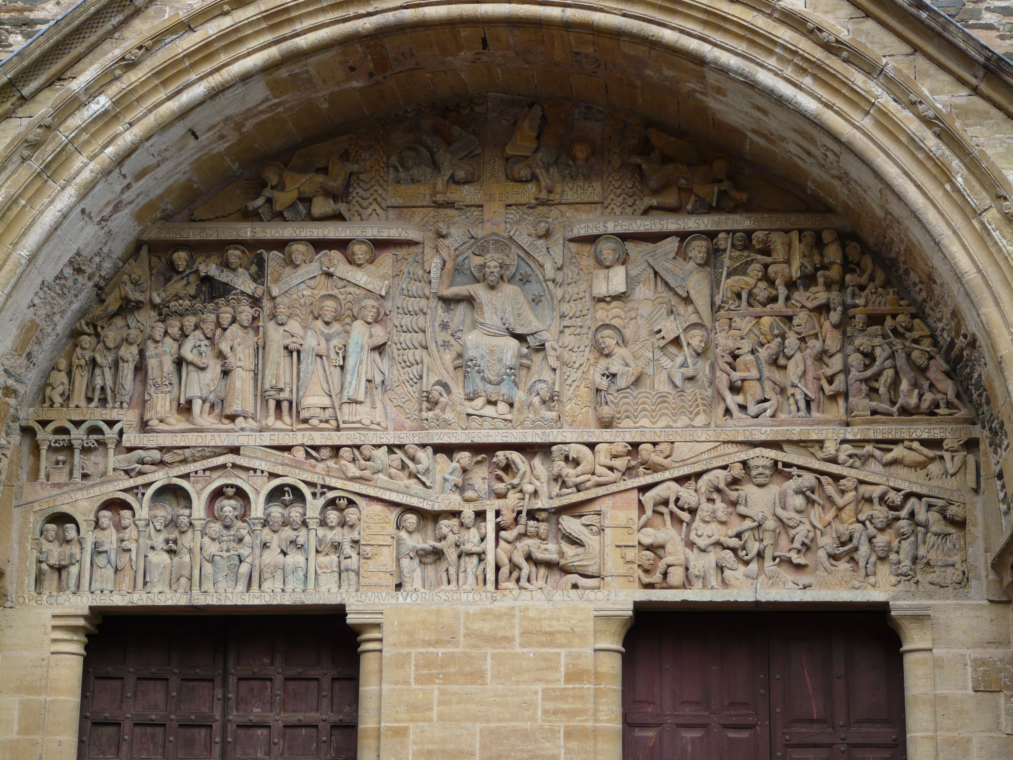 Le tympan de l'Abbatiale Sainte-Foy de Conques (France - Aveyron) représentant le jugement dernier. .